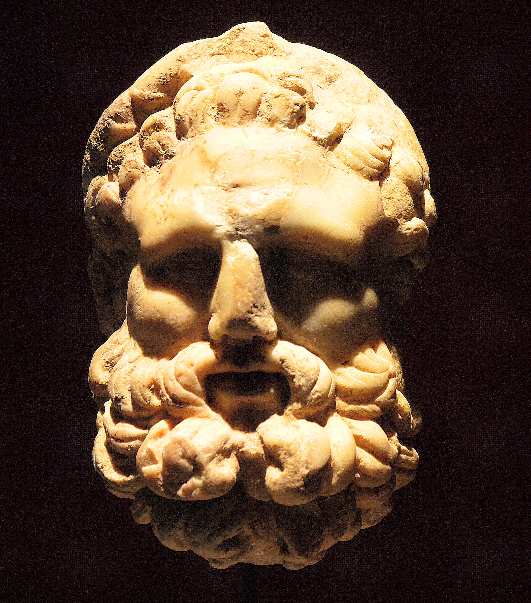 S. I d. e. Hércules. Mármol. Museo de Málaga. Esta pieza es de procedencia desconocida.